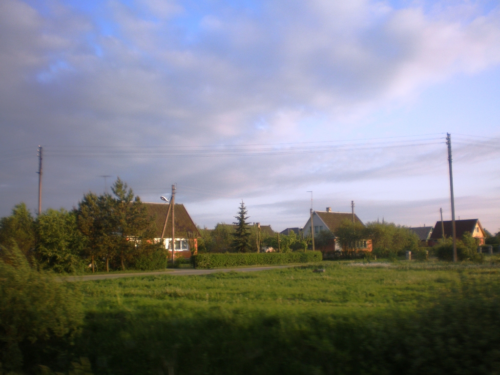 Josvainiai palei kelią į Čiukiškius Foto: Hugo.arg 2007.05.23